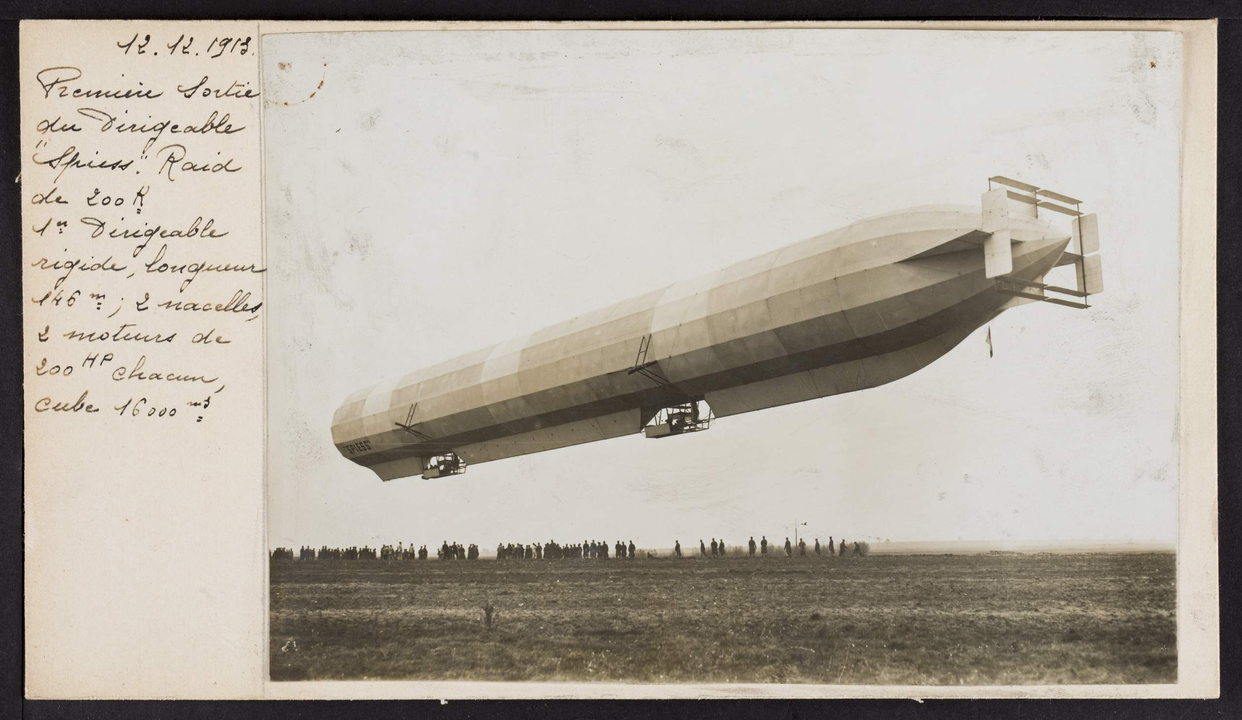 12 décembre 1913. Première sortie du dirigeable « Spiess ». Raid de 200 kilomètres.